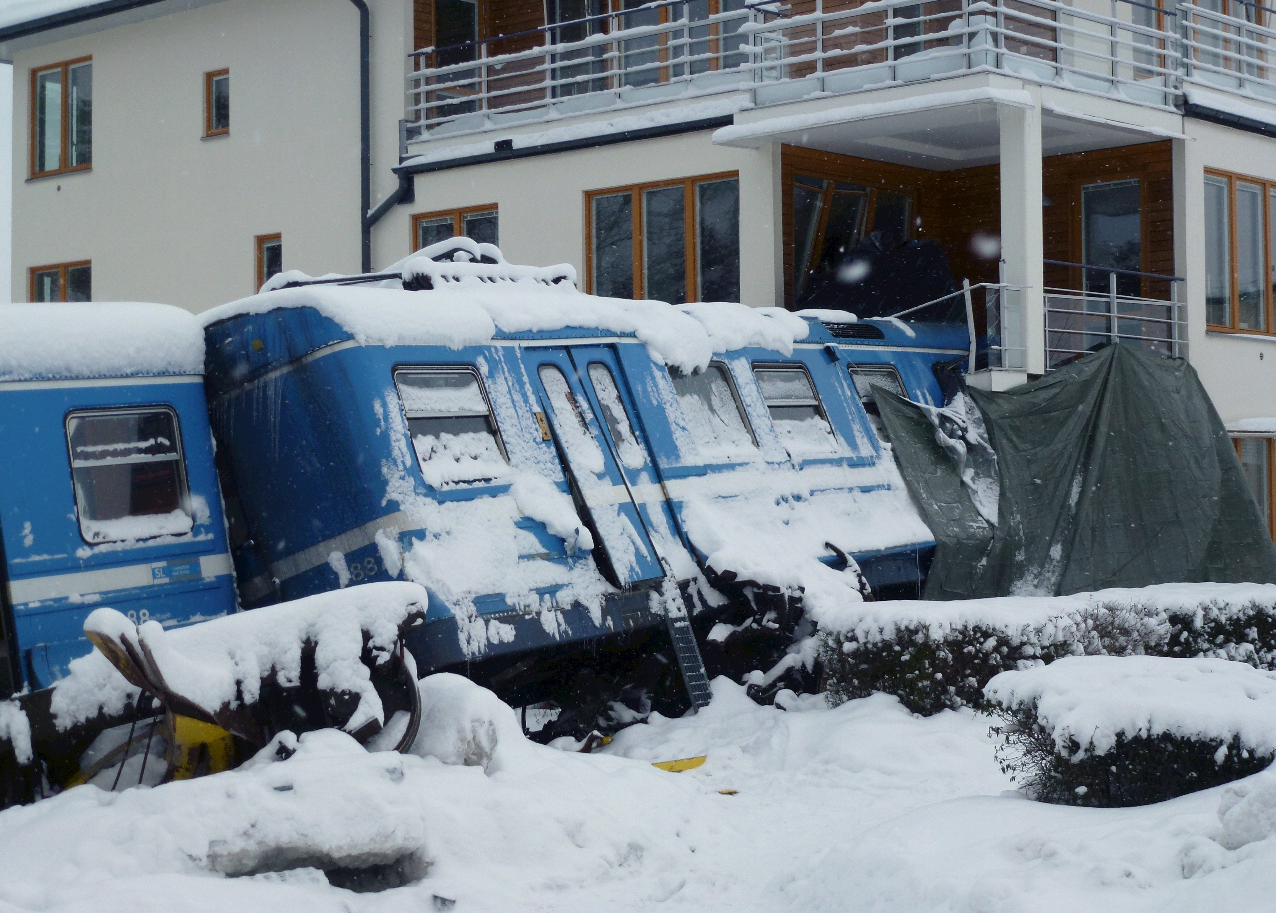 Saltsjöbadsolyckan den 15 januari 2013